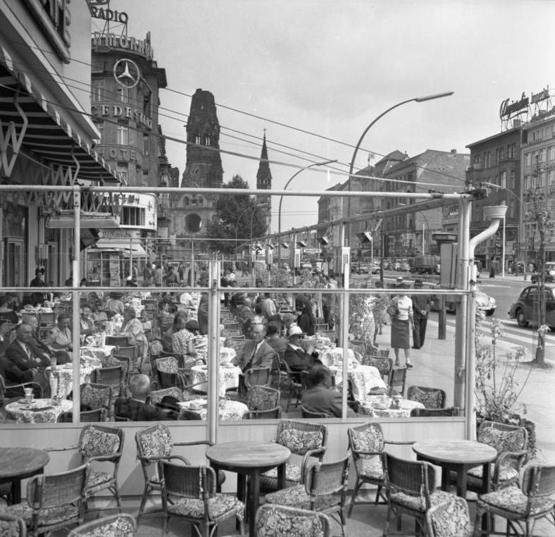 Stadtaufnahmen Berlin